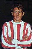 Néstor Togneri, como jugador de Estudiantes de La Plata; llegó al club procedente de Platense, en 1968, y fue el autor del gol que definió la Copa Libertadores 1970 a favor del conjunto de La Plata.